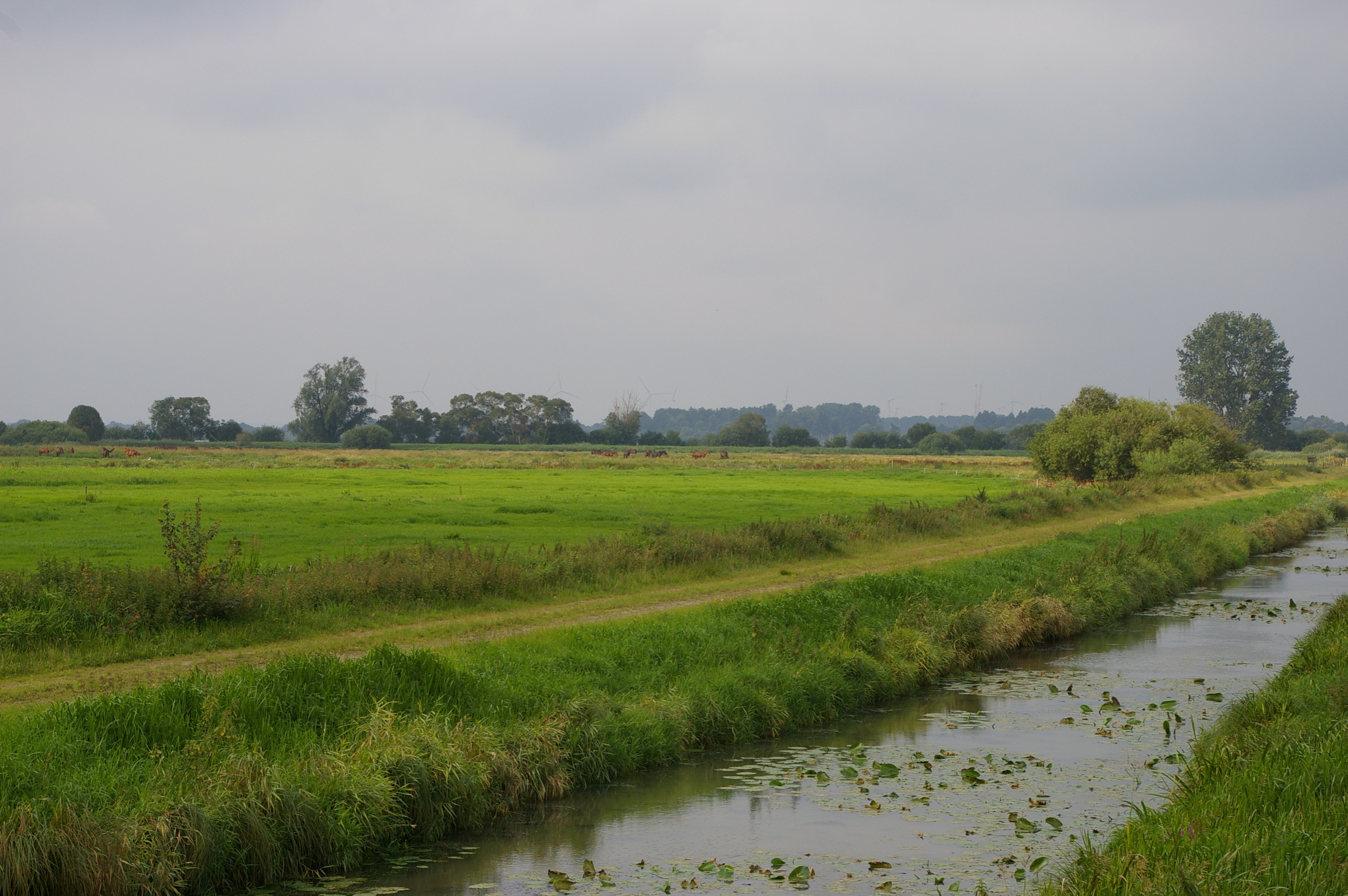 Huntebruch und Huntebruchwiesen